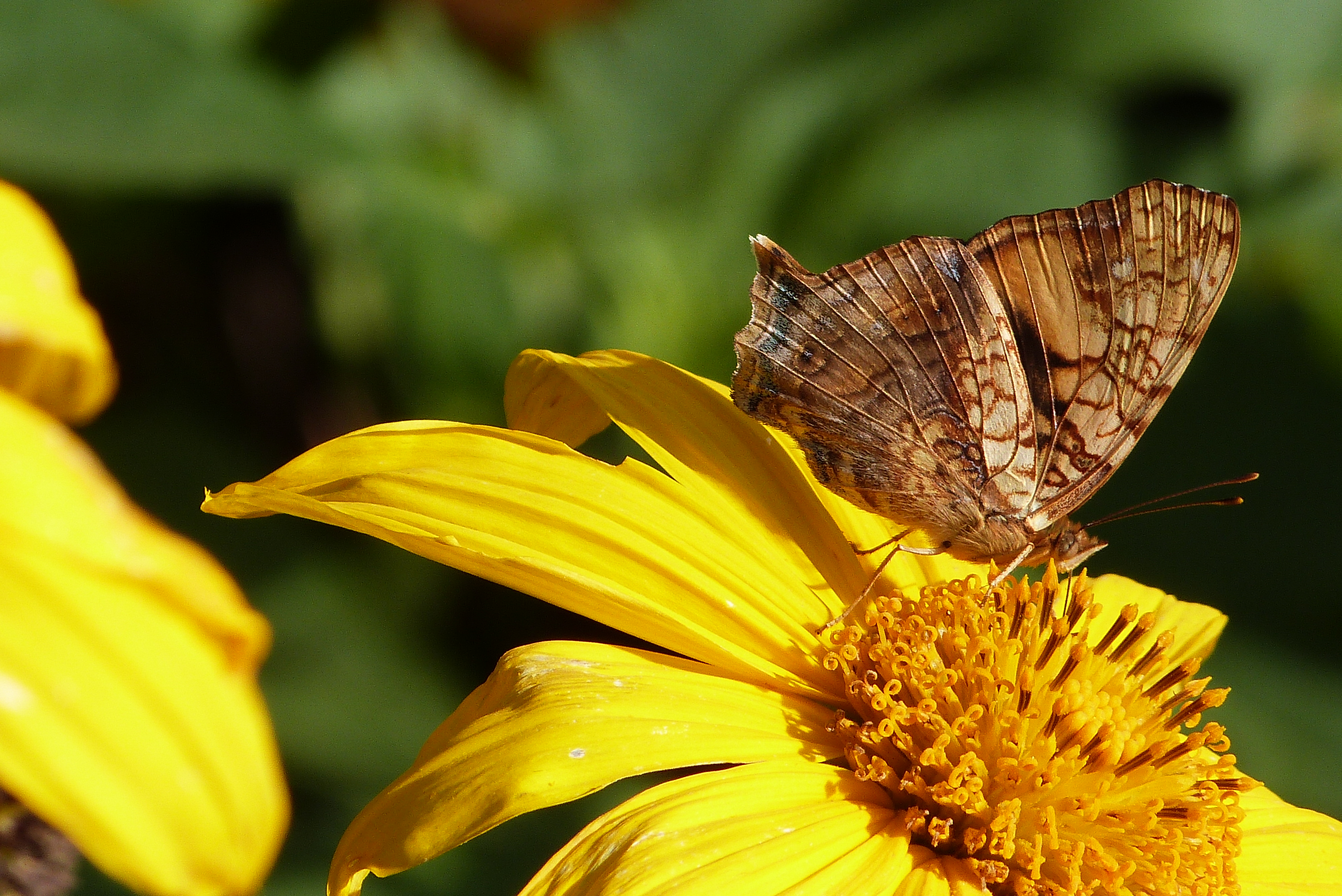 Foto tirada em Mairiporã - SP